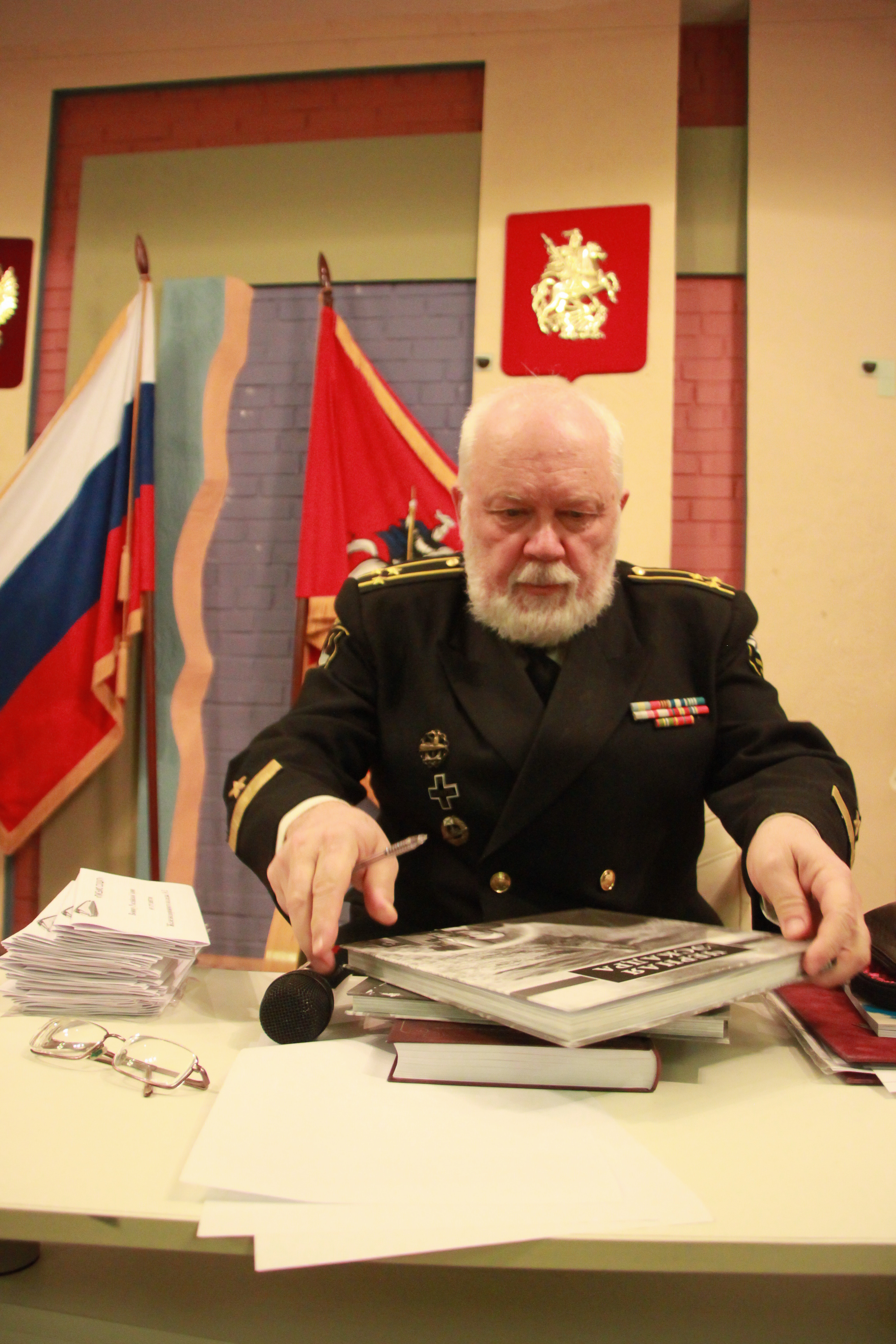 Писатель-маринист Николай Черкашин